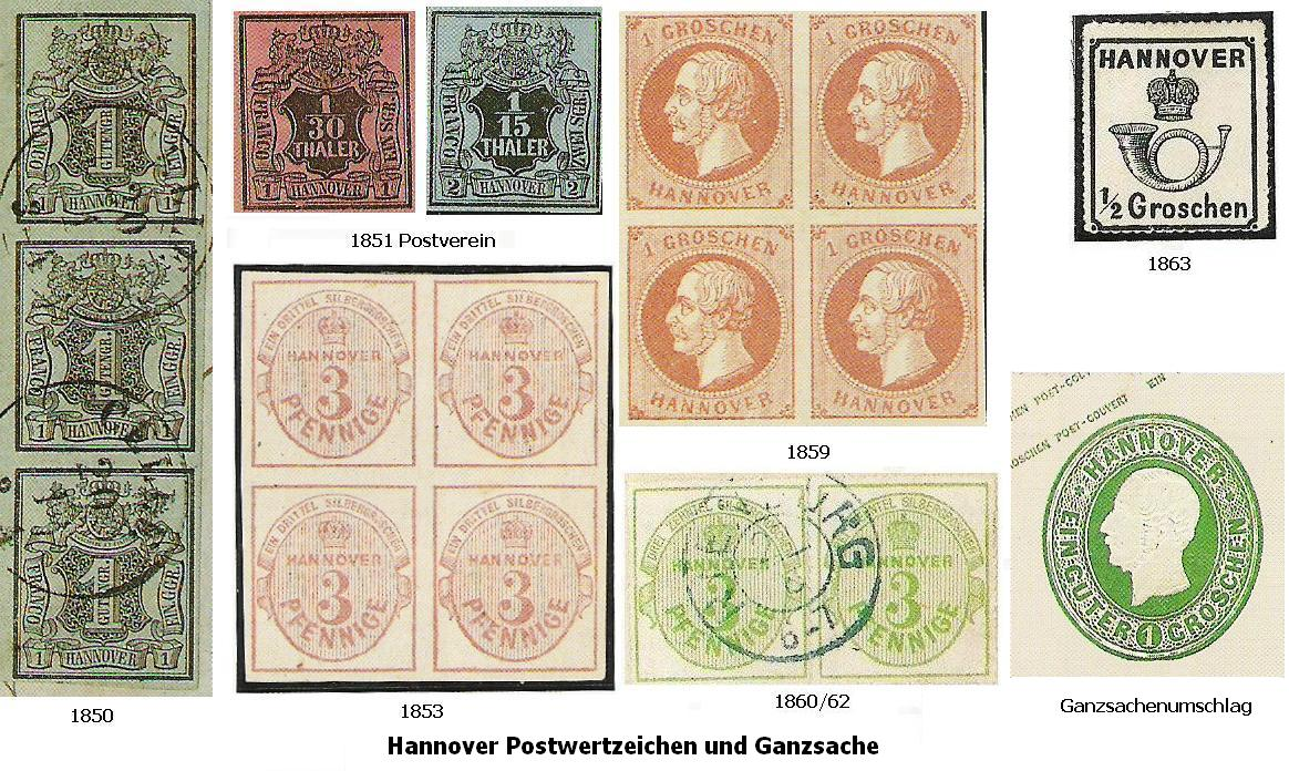 Hannoversche Postwertzeichen